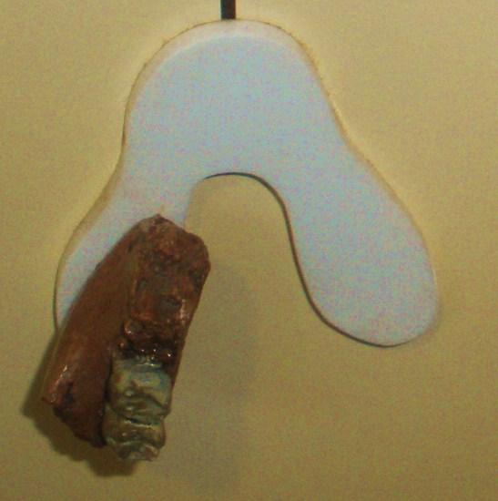 Fossil of Sivapithecus, an extinct mammal -- Took the photo at Natural History Museum, London